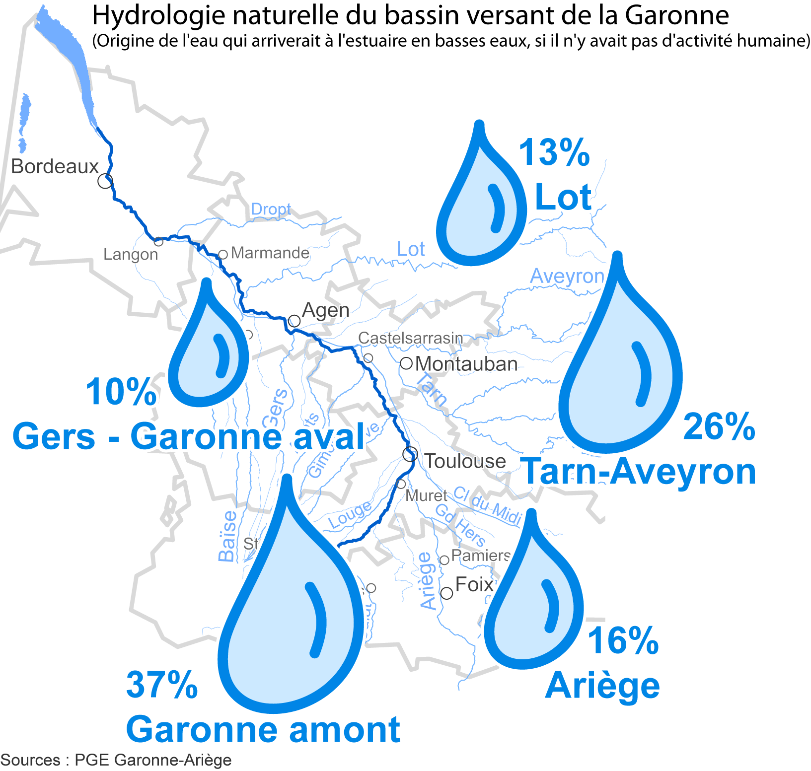 Carte de l'hydrologie naturelle en étiage du bassin versant du fleuve Garonne